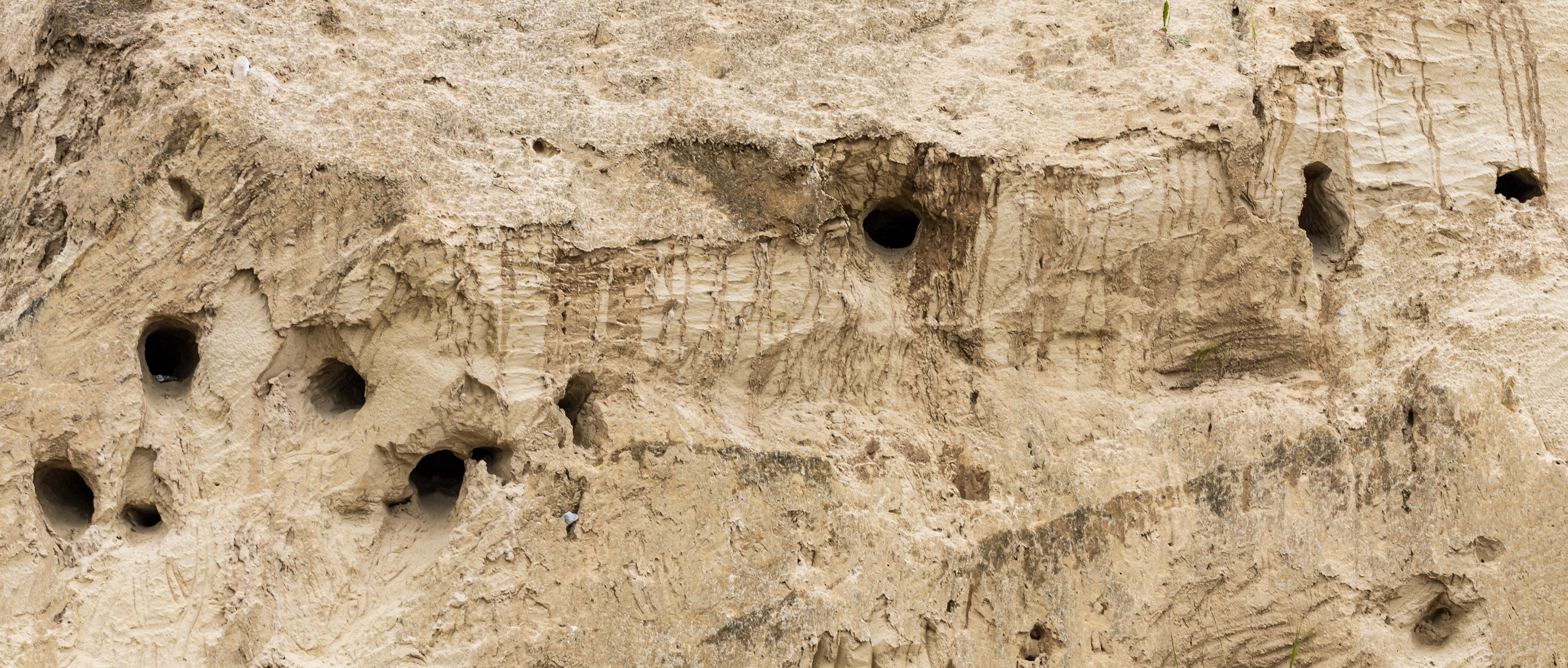 Uferschwalben-Brutwand in der Steilküste von Schwedeneck im Landschaftsschutzgebiet Küstenlandschaft Dänischer Wohld